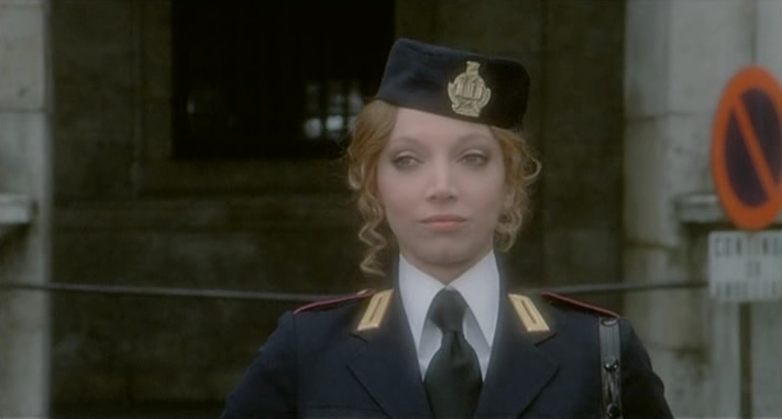 Screenshot del film La poliziotta di Steno (1974)